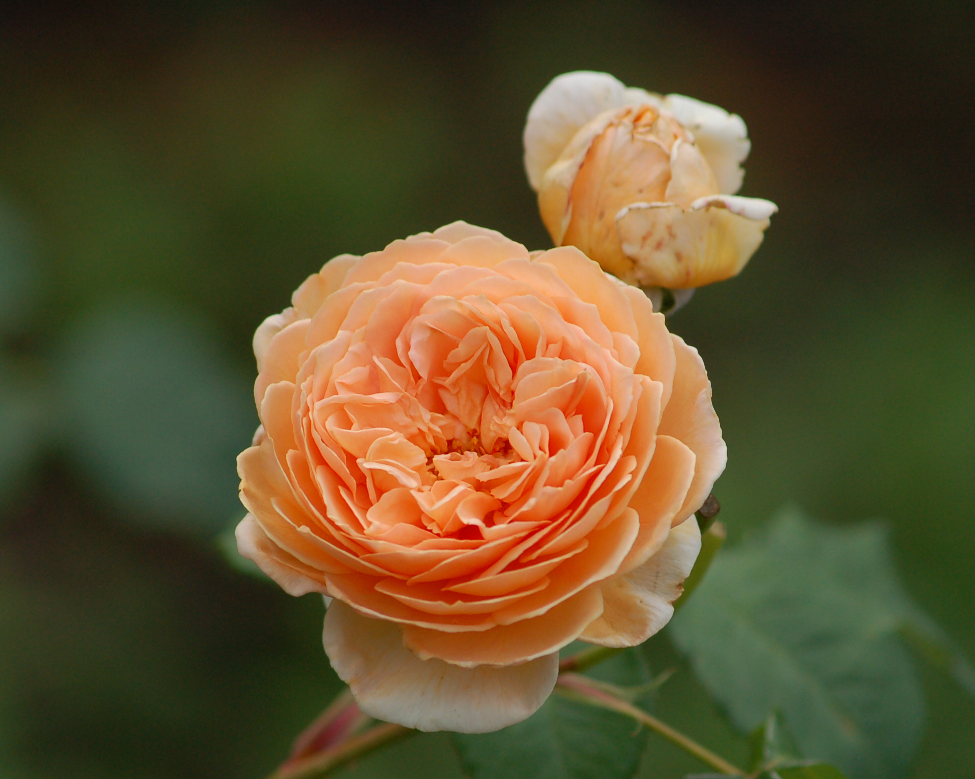 Englische Rose Kronprincess Margareta (Austin 1999)